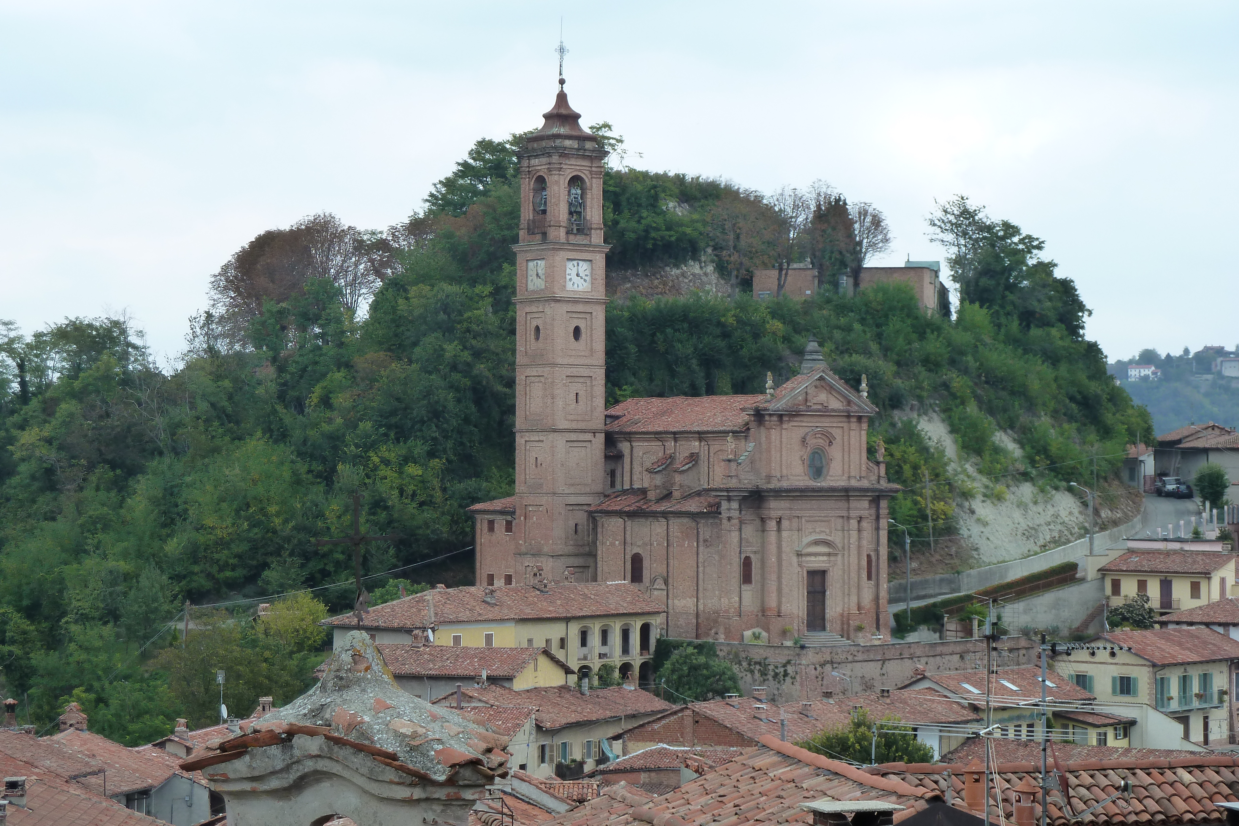 Kirche Aramengo